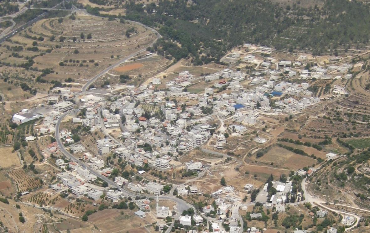 צילום אויר של הכפר עין נקובא Ein Naqquba in Israel